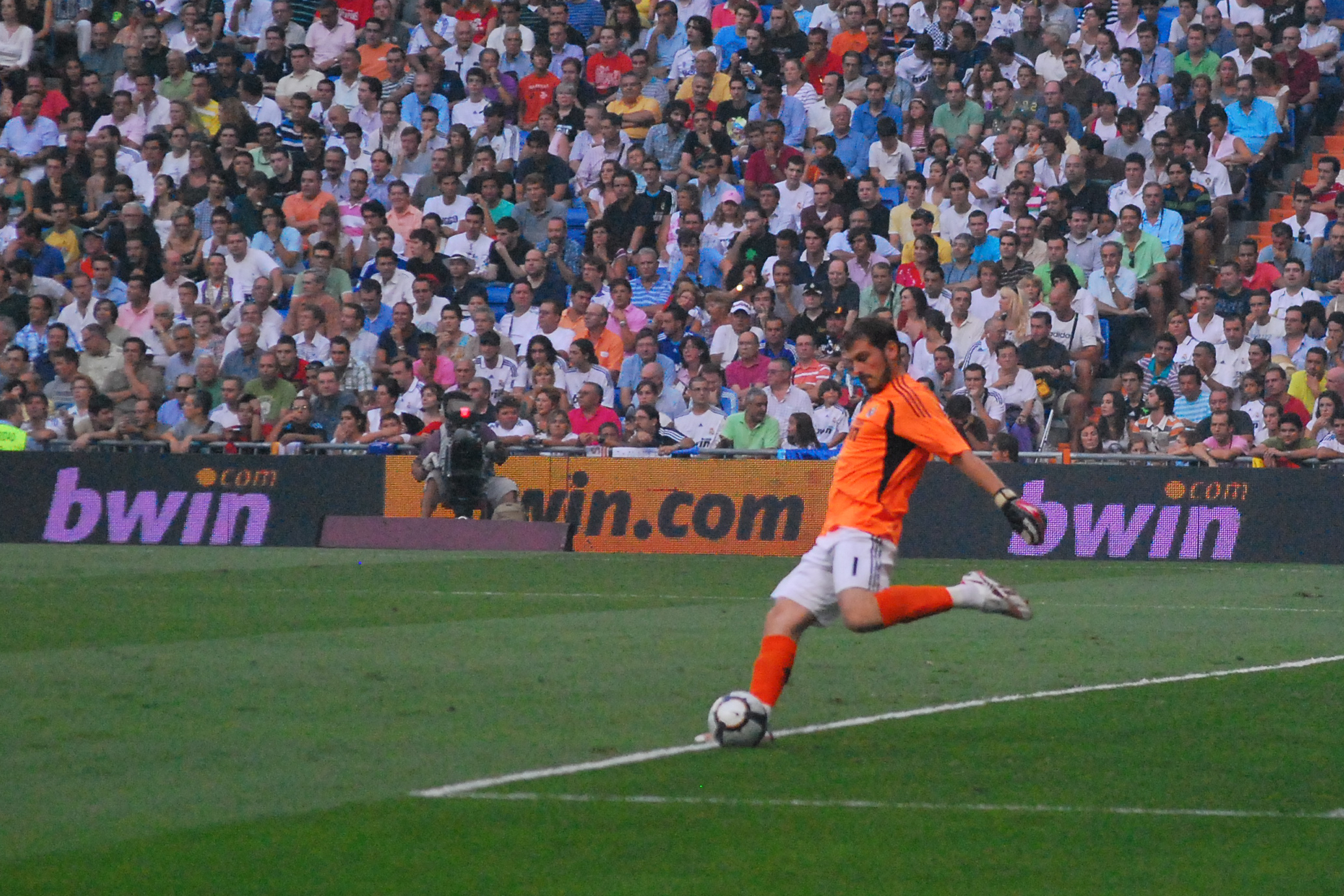 Real Madrid 3-Depor 2 , 29-8-09